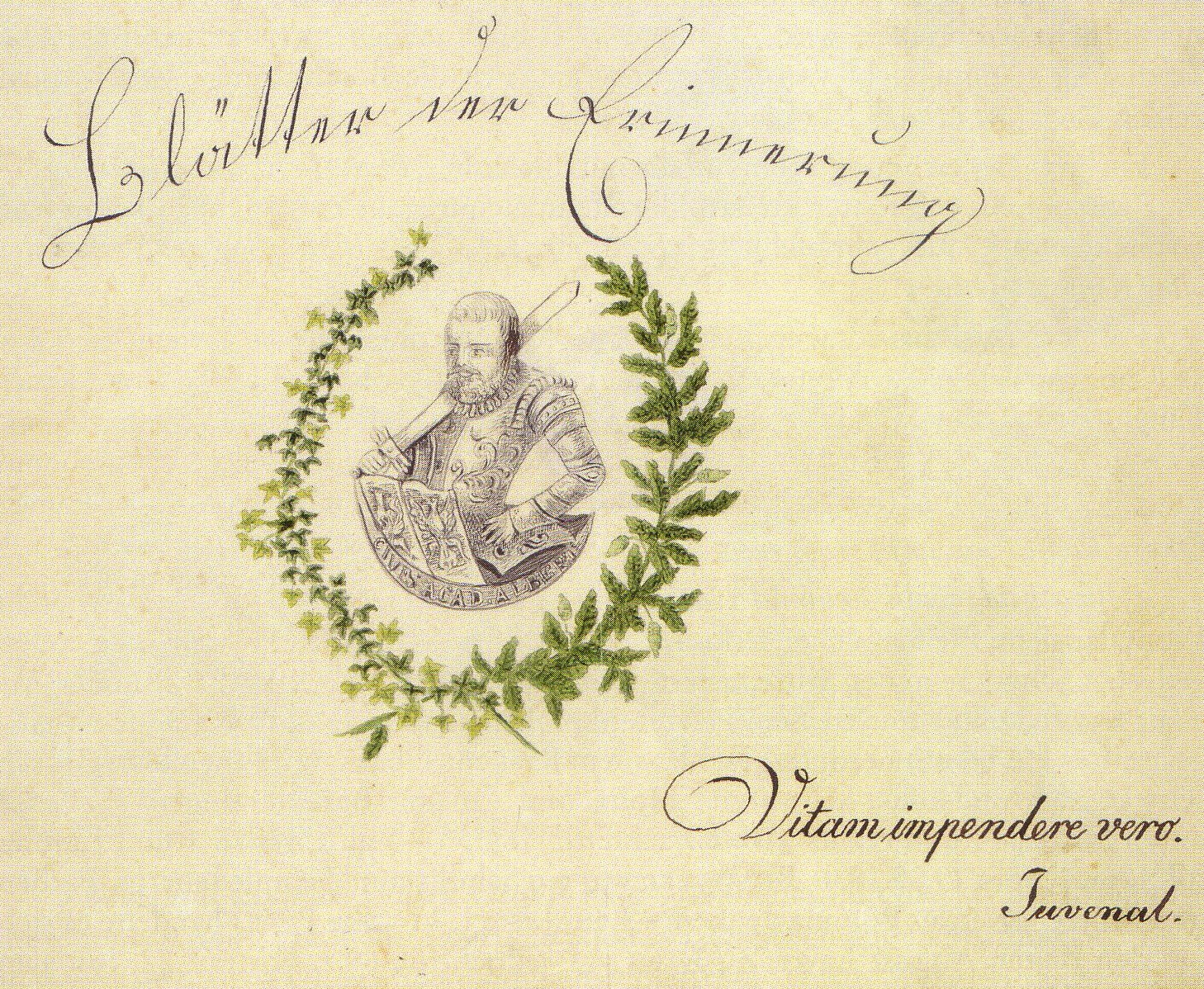 Schmutztitel des Album amicorum / Blätter der Erinnerung